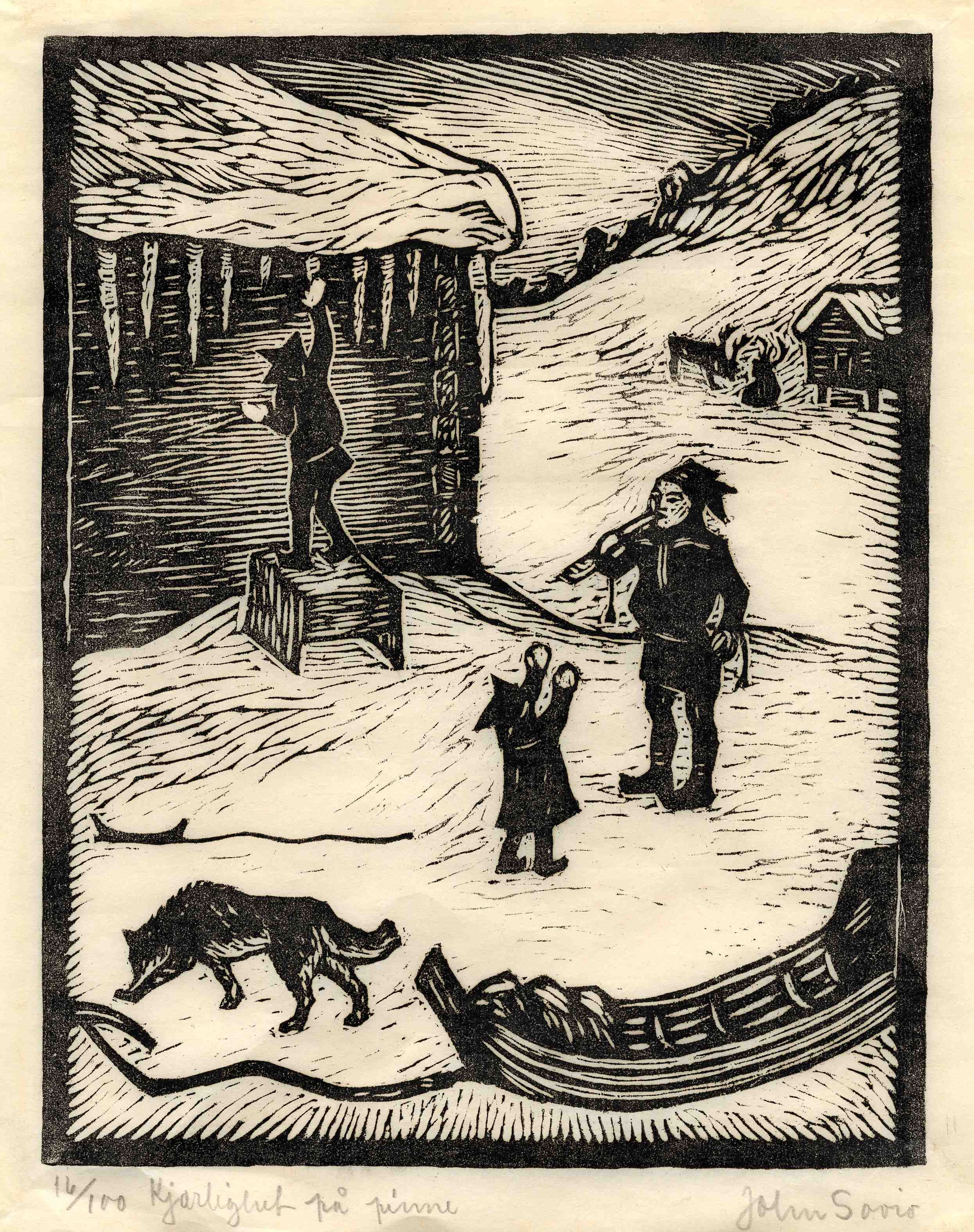 woodcut Saviomuseet Native nameSaviomuseaLocationKirkenesEstablished1994Authority control : Q16799144 institution QS:P195,Q16799144 Vinterscene med tre koftekledde gutter som henter istapper fra takhenget på et hus for å spise dem. En har allerede hentet seg en istapp og står og spiser på den, en annen strekker seg for å få tak i en istapp fra hustaket, mens den tredje og minste gutten strekker armene opp for å få istappen til den første. Hund som snuser på bakken og en tom pulk i forgrunnen. Tømmerhus, to rein og fjell i bakgrunnen.